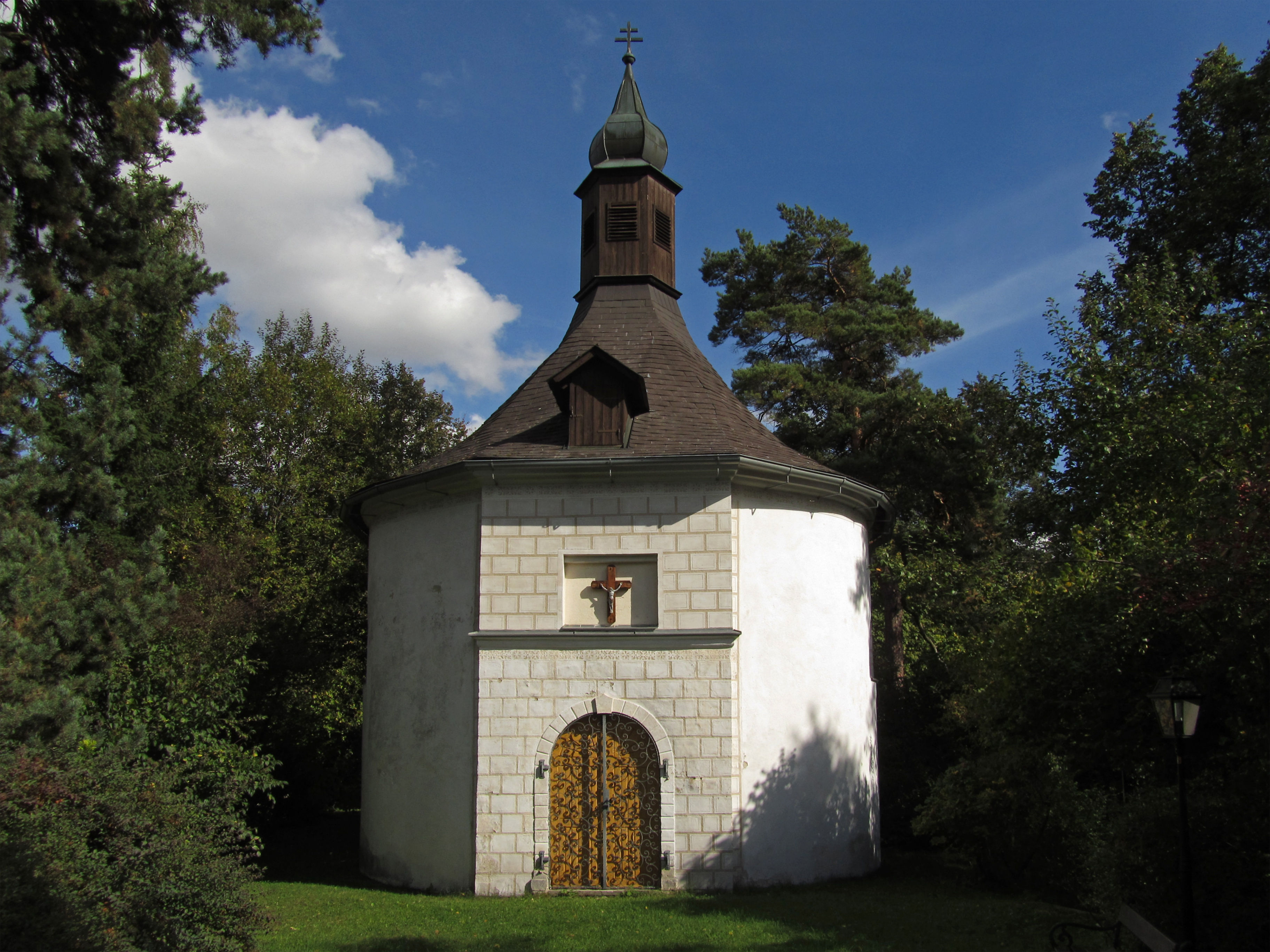 Kapelle hl. Ägidius in Gilgenberg